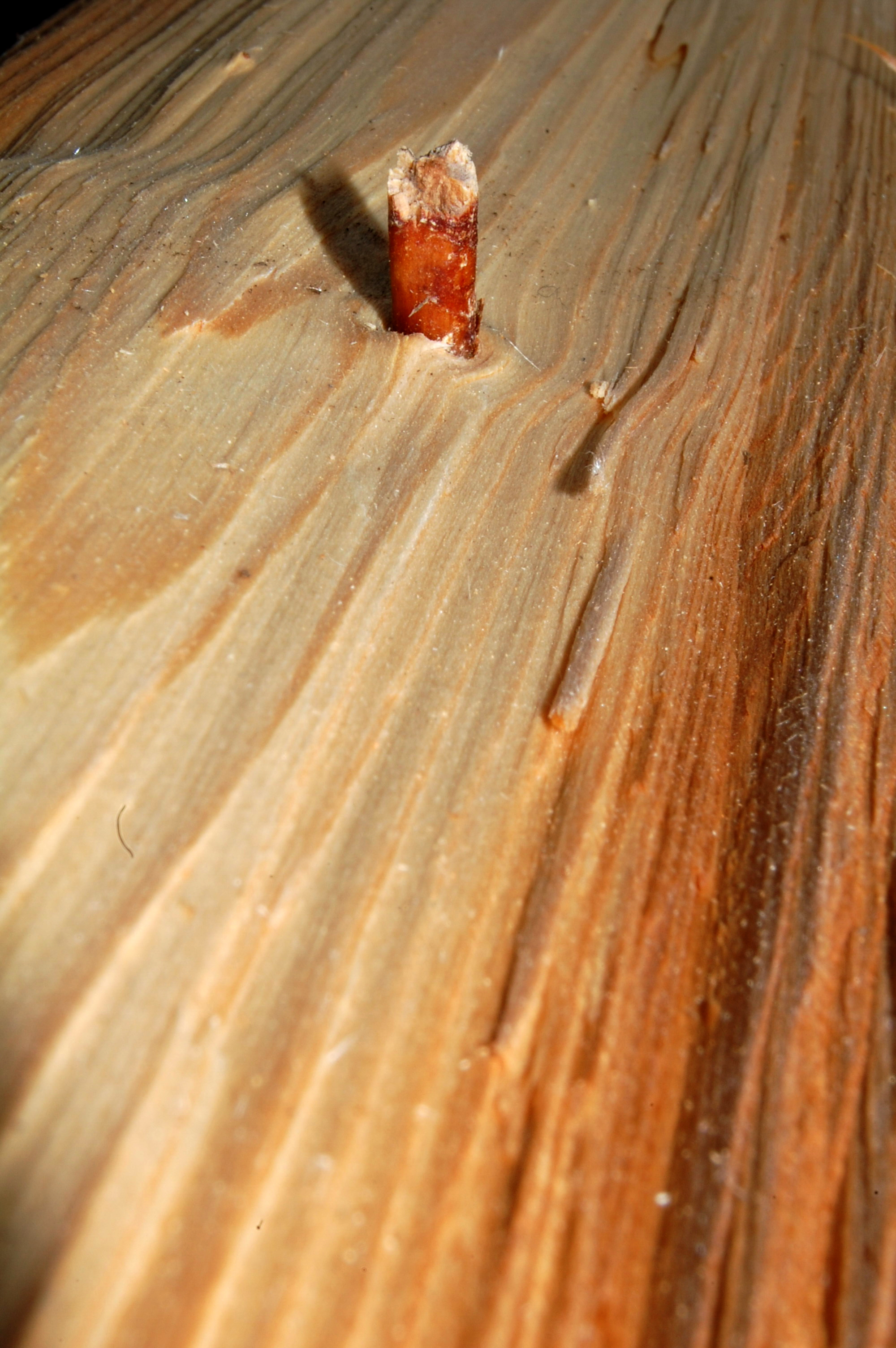 сучок дерева